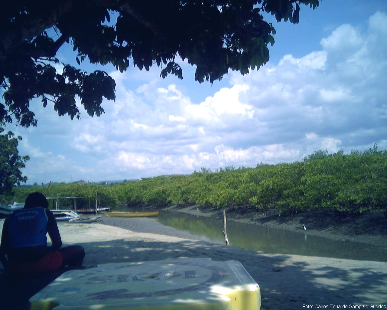 Foto da praia do Porto ou cais em Saubara na Bahia no Brazil - Enviadas por e-mail para que eu as coloca-se na wiki.